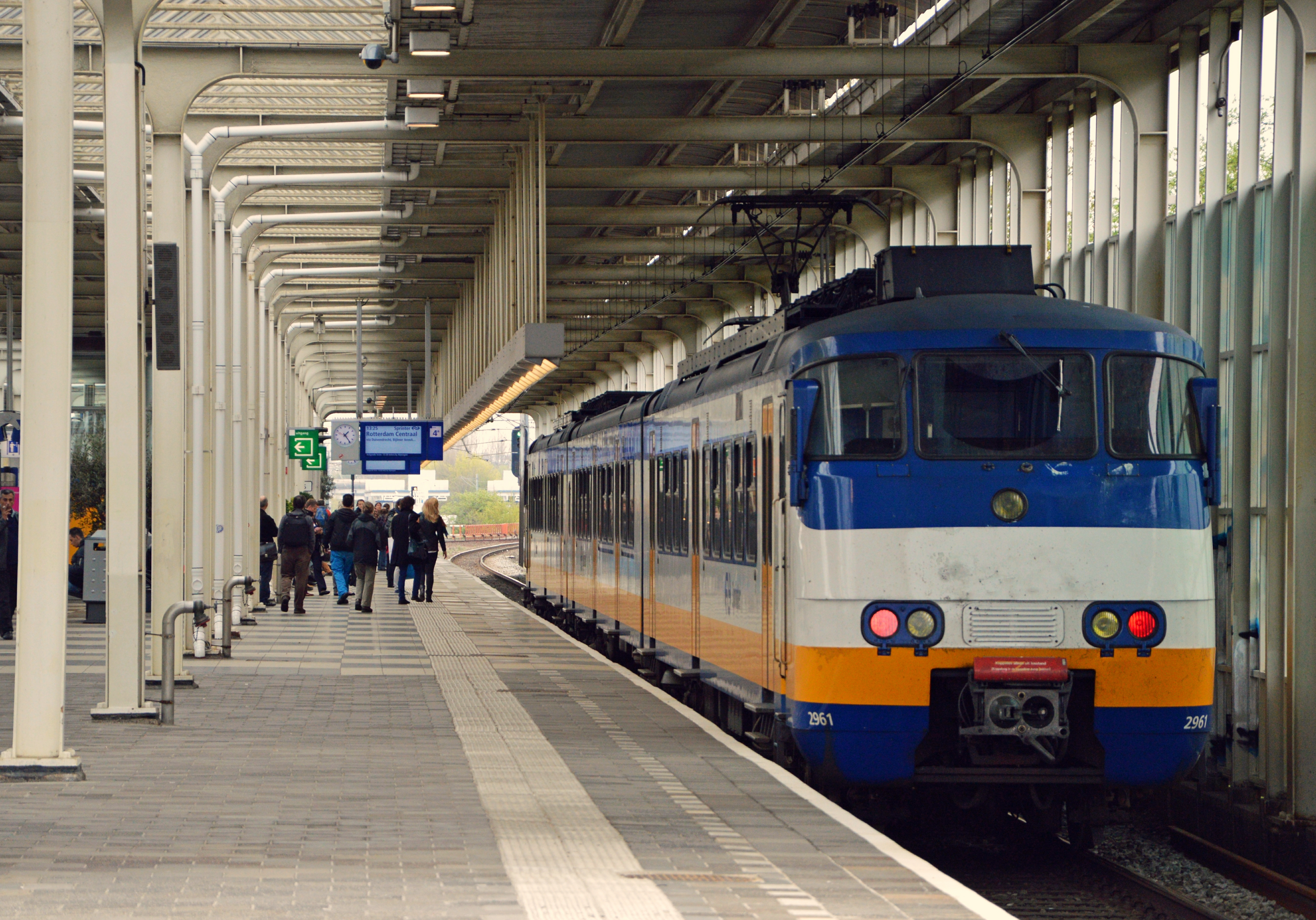 SGMm2961 Amstel-Breukelen-Rotterdam